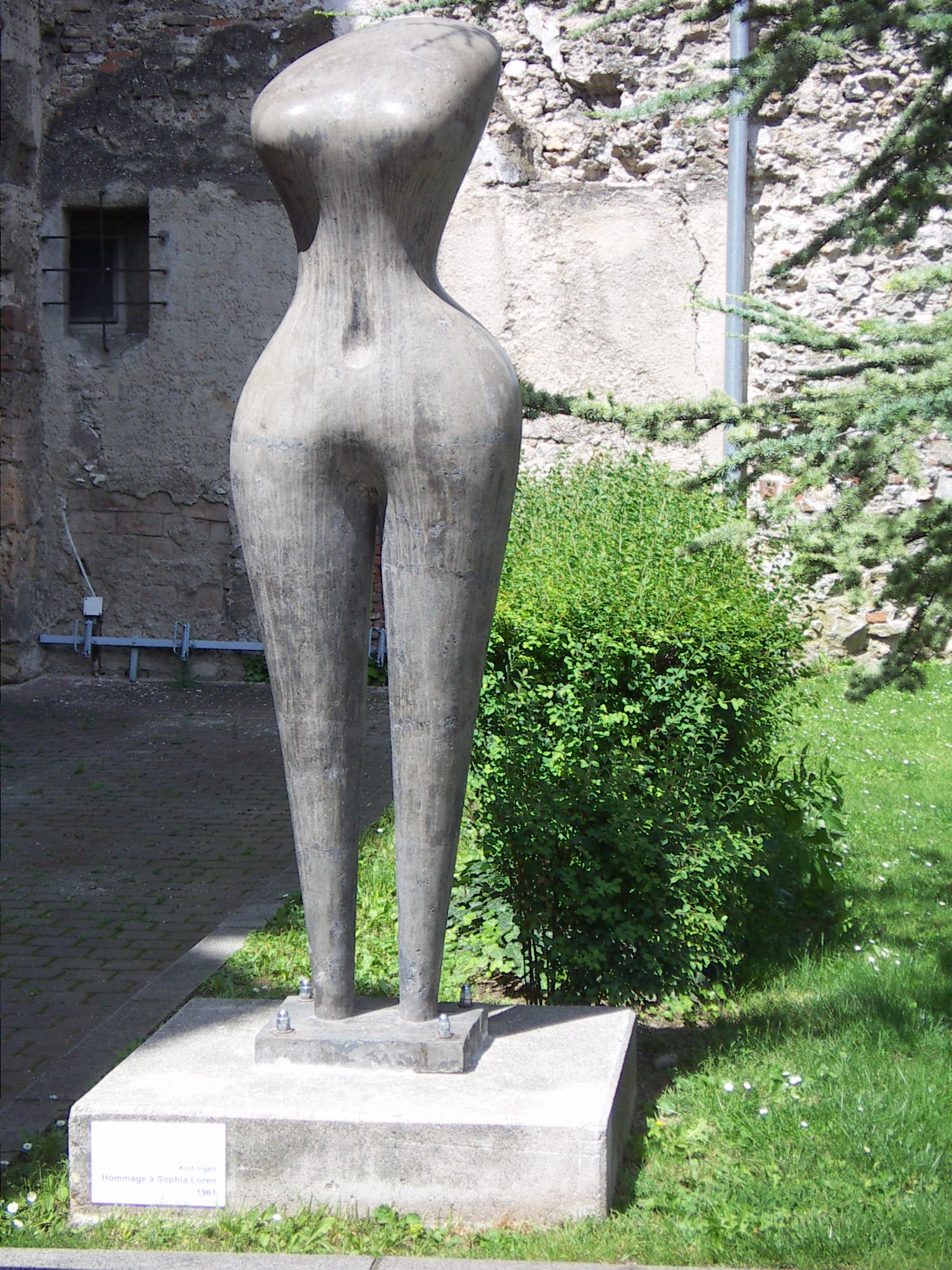 Plastik von Kurt Ingerl, situiert vor St. Peter an der Sperr